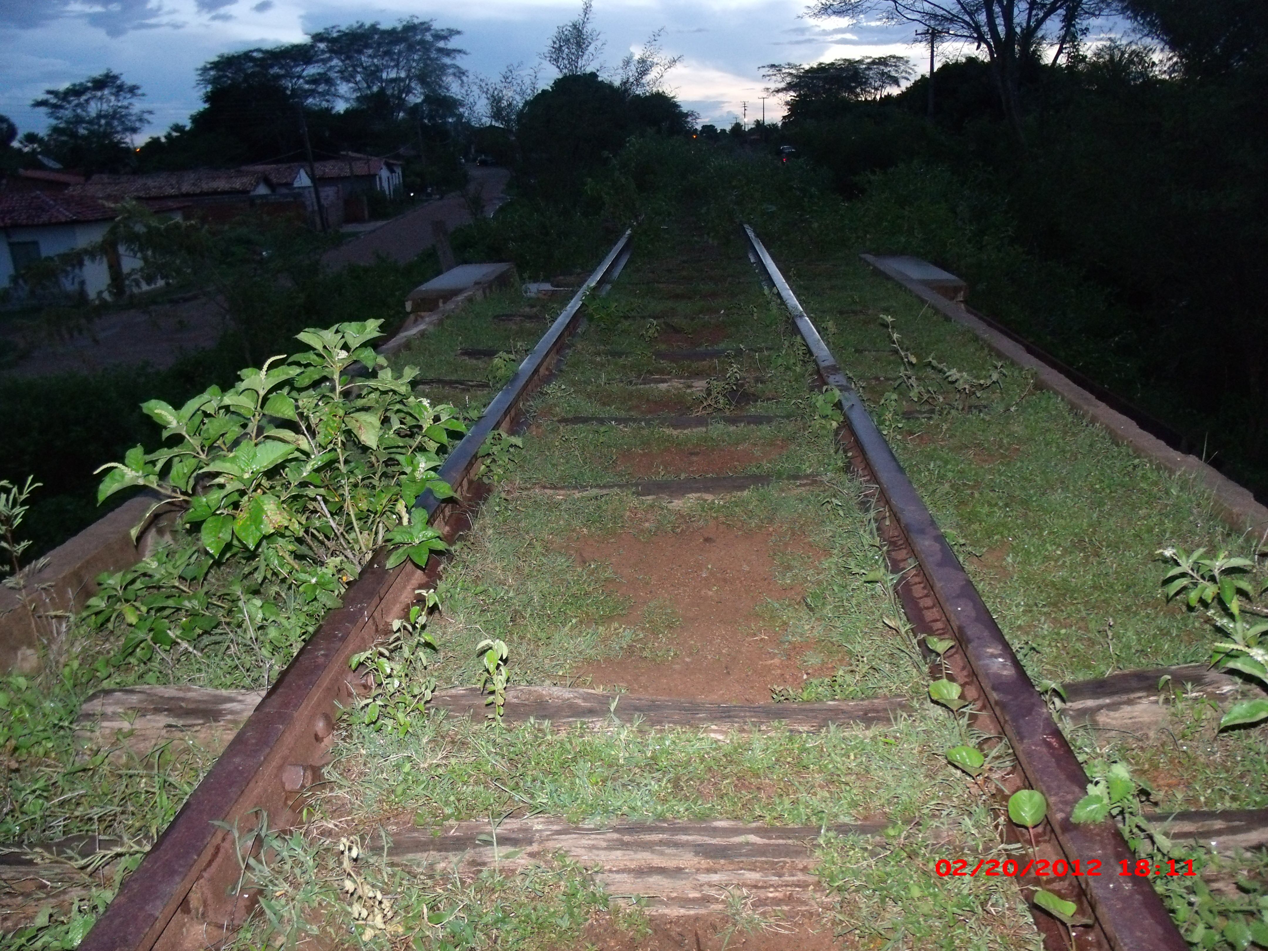 Trecho da antinga EFCP Estrada de Ferro Central do Piauí.